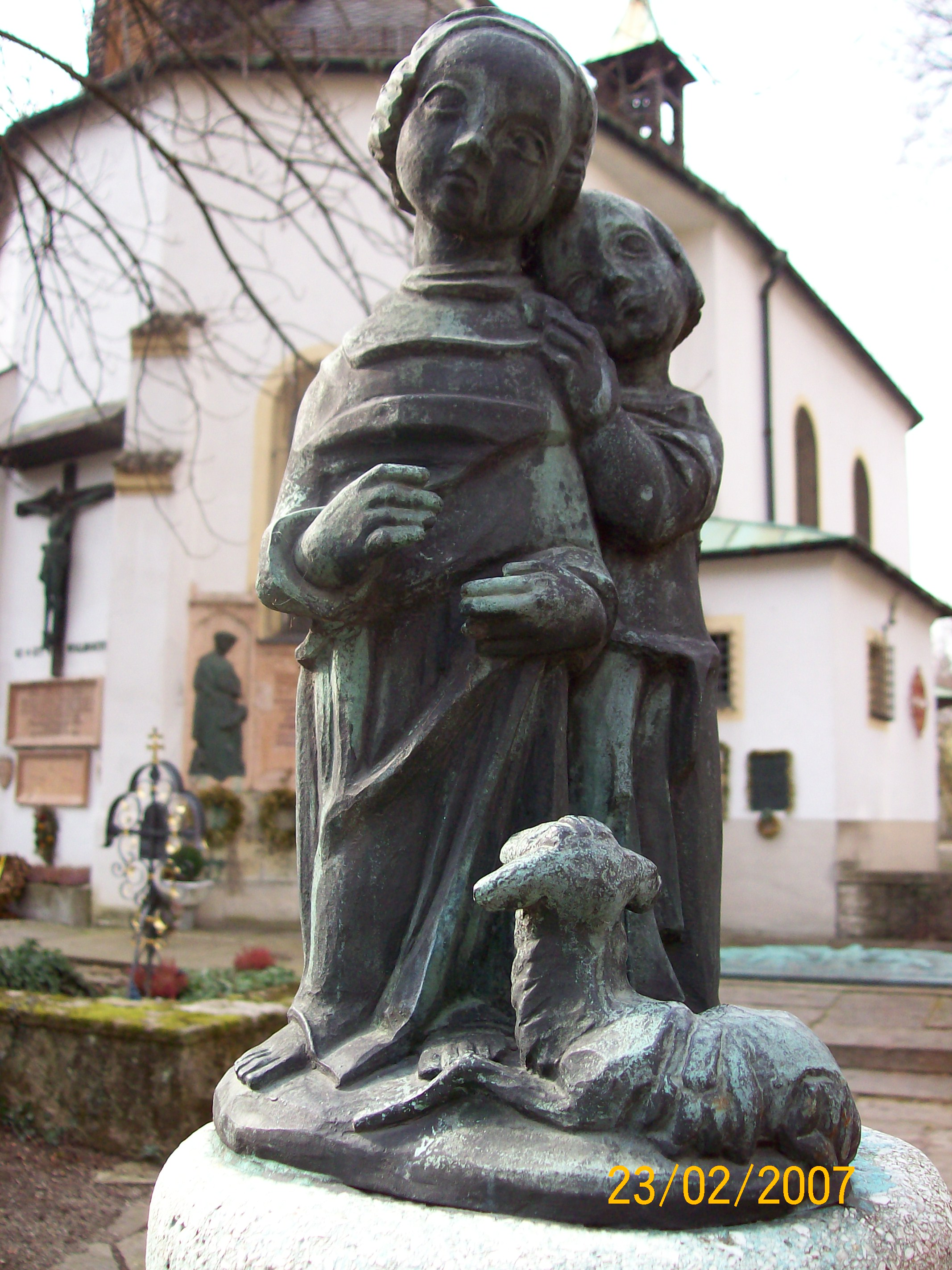 Märchengruppe von Ruth Schaumann, Detail des Peter Dörfler-Brunnens